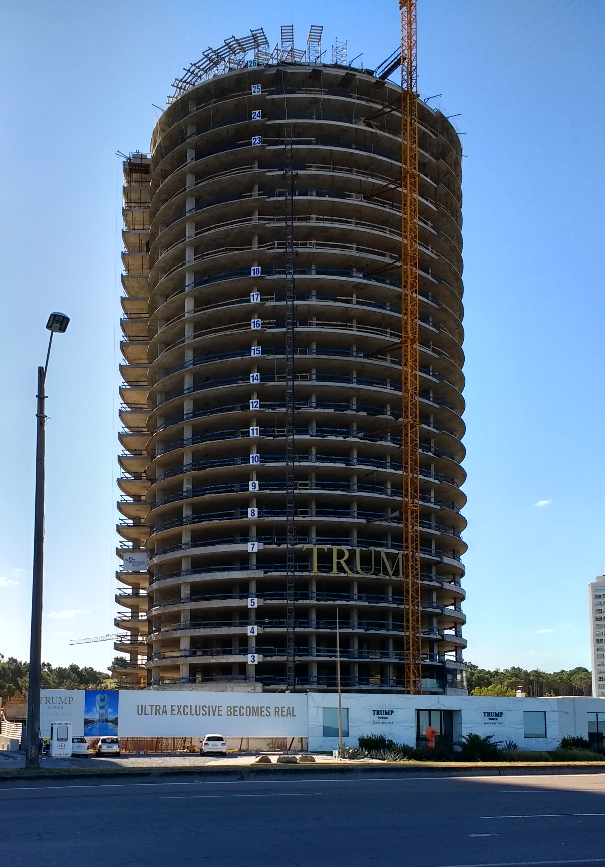 Trump Tower Punta del Este, under construction in April 2017.